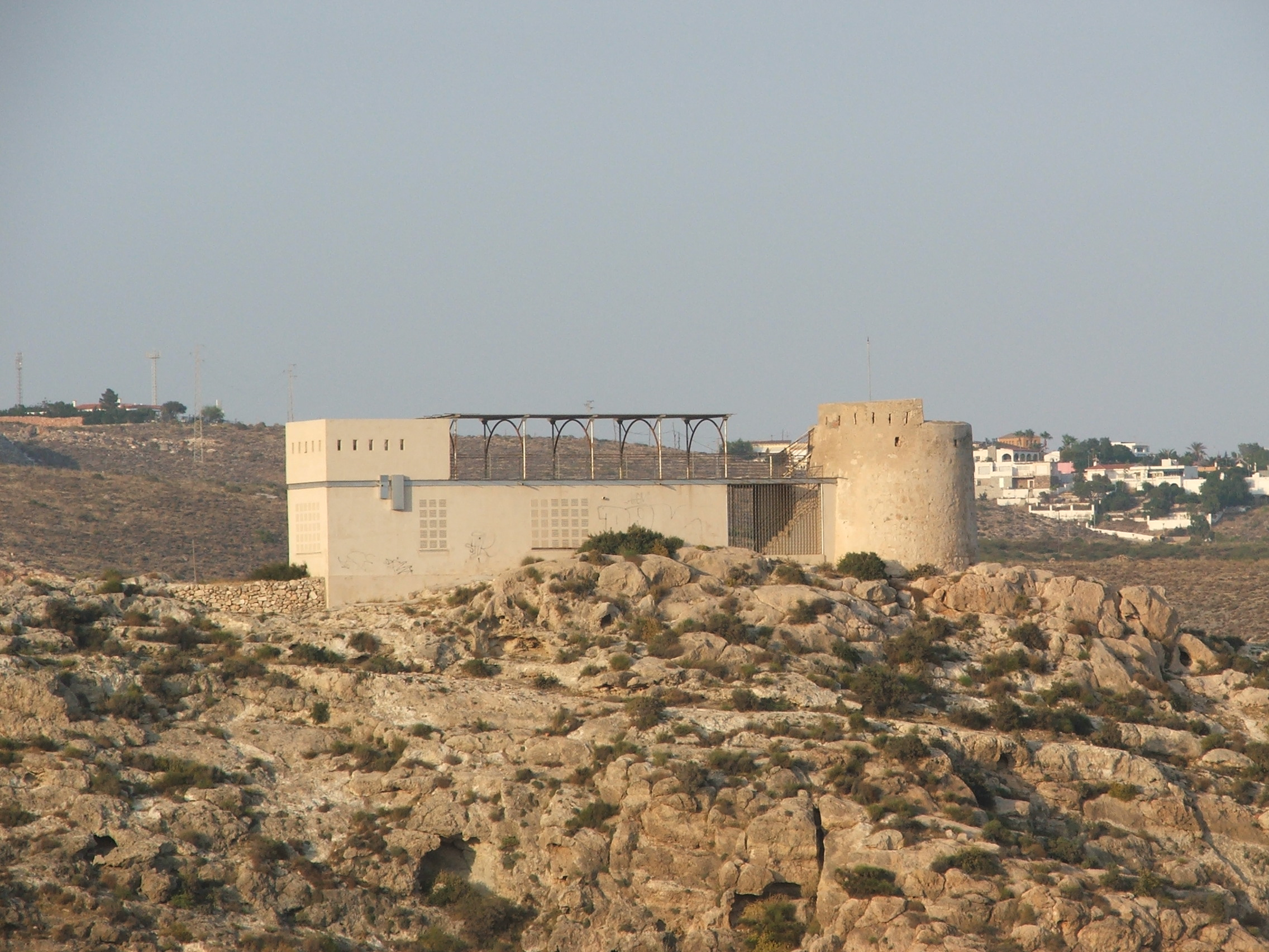 Fotografía de la Torre vigía de la Garrofa, con vistas a Castell del Rey al fondo, Almería, Andalucía, España.